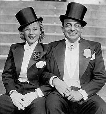 Bársony Rózsi és későbbi férje Dénes Oszkár a "Bál a Savoyban"-ban